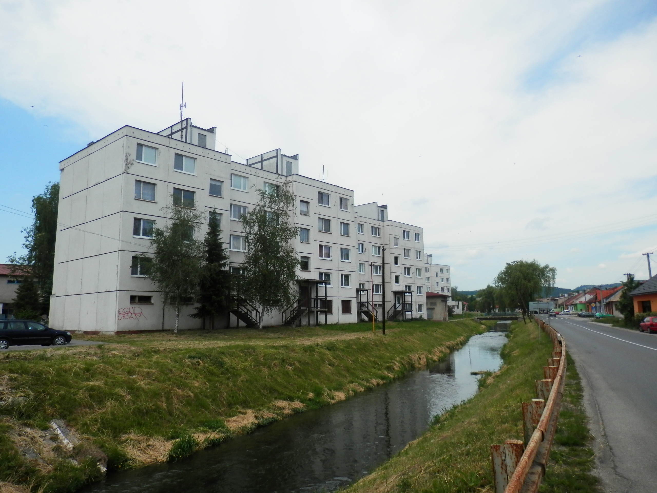 Mesto Spišské Vlachy. Okres Spišská Nová Ves.